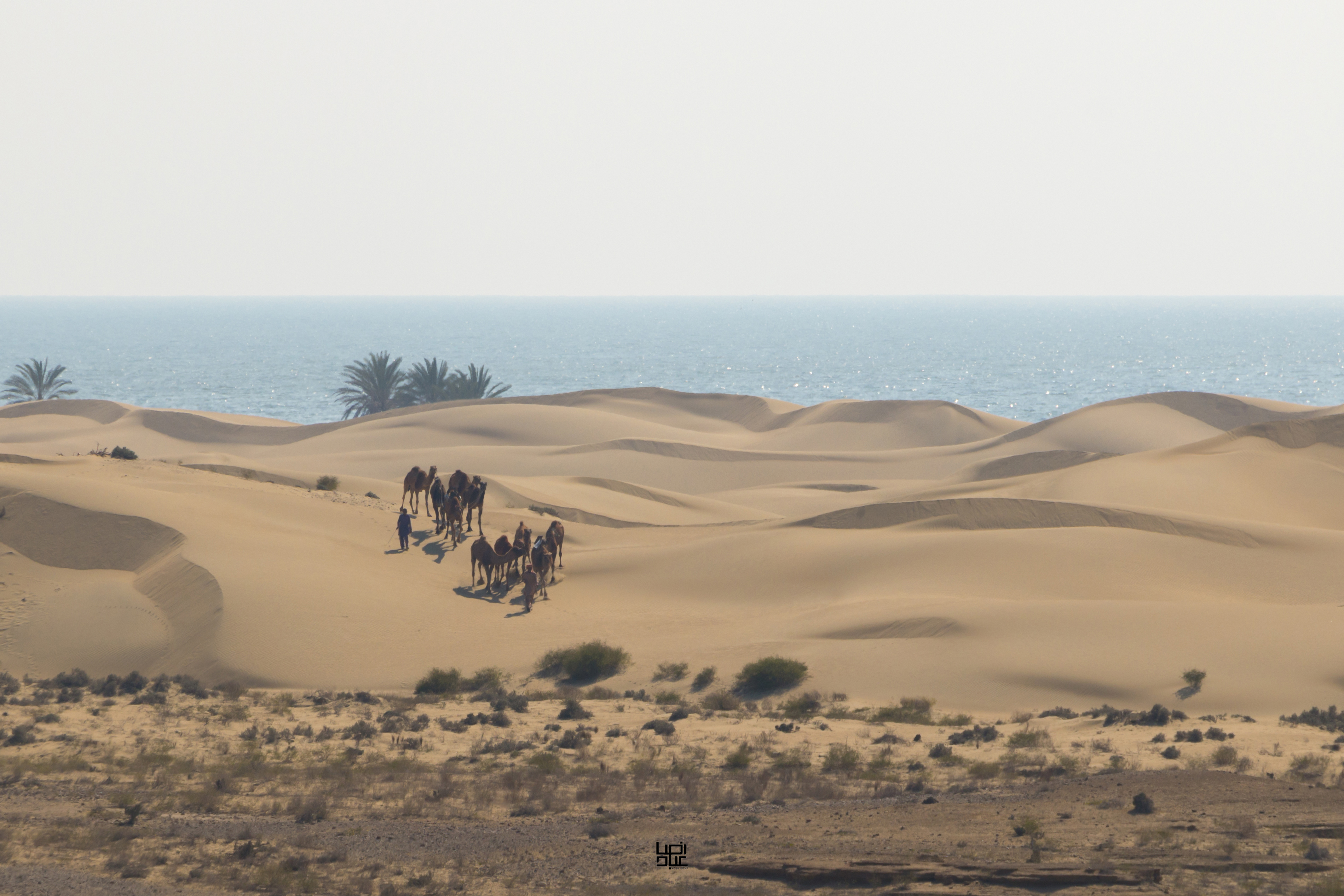 محوطه درک